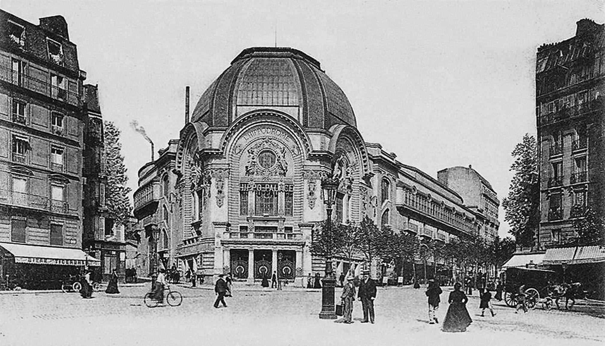 L'Hippodrome de Paris ou Hippo-Palace, vers 1910